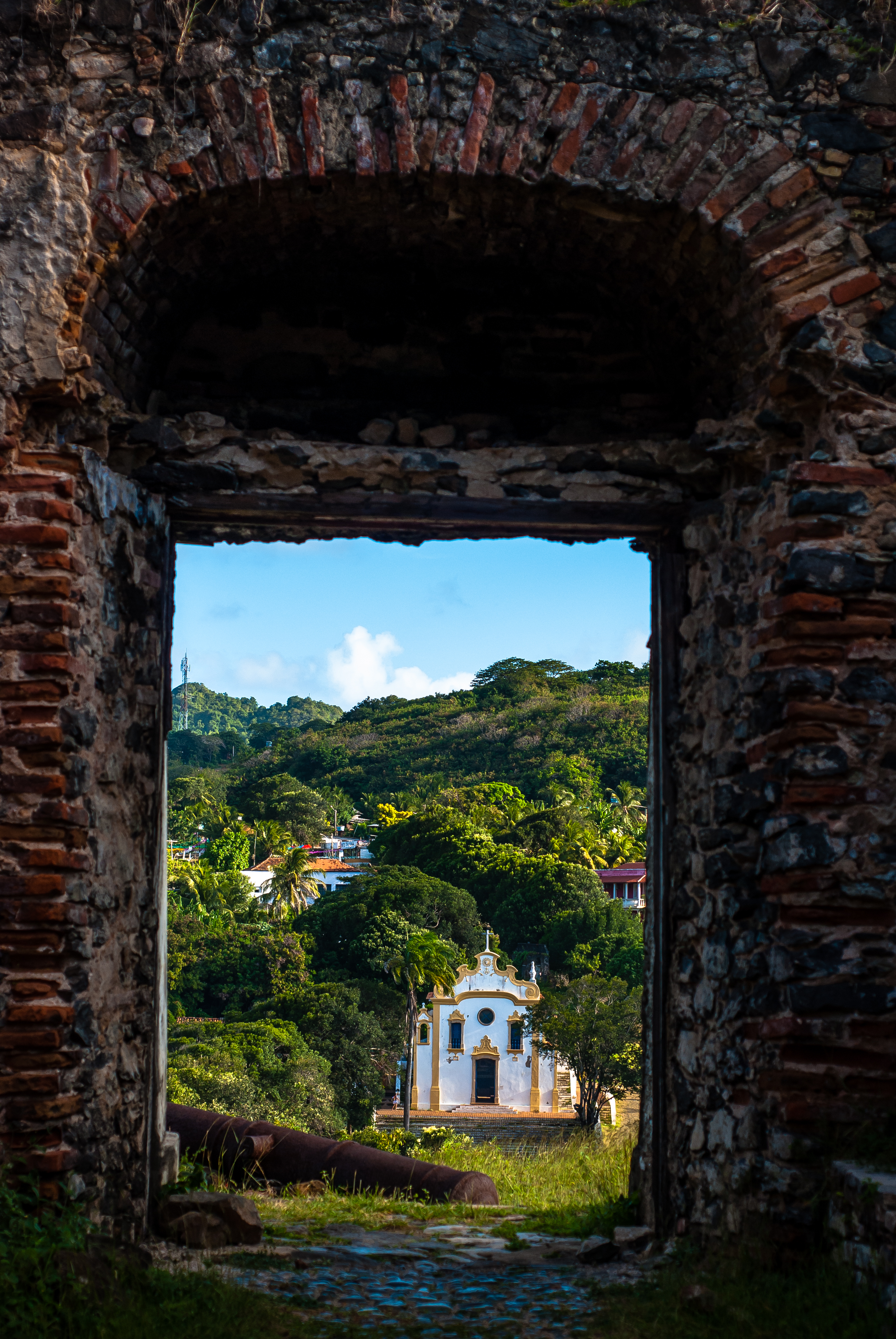 Igreja de Nossa Senhora dos Remédios vista do Forte de Nossa Senhora dos Remédios - Fernando de Noronha, Pernambuco, Brasil